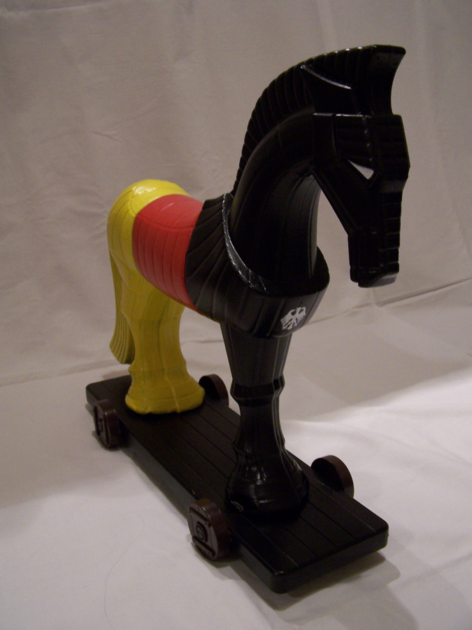 Plastische Darstellung des Bundestrojaners vom Chaos Computer Club